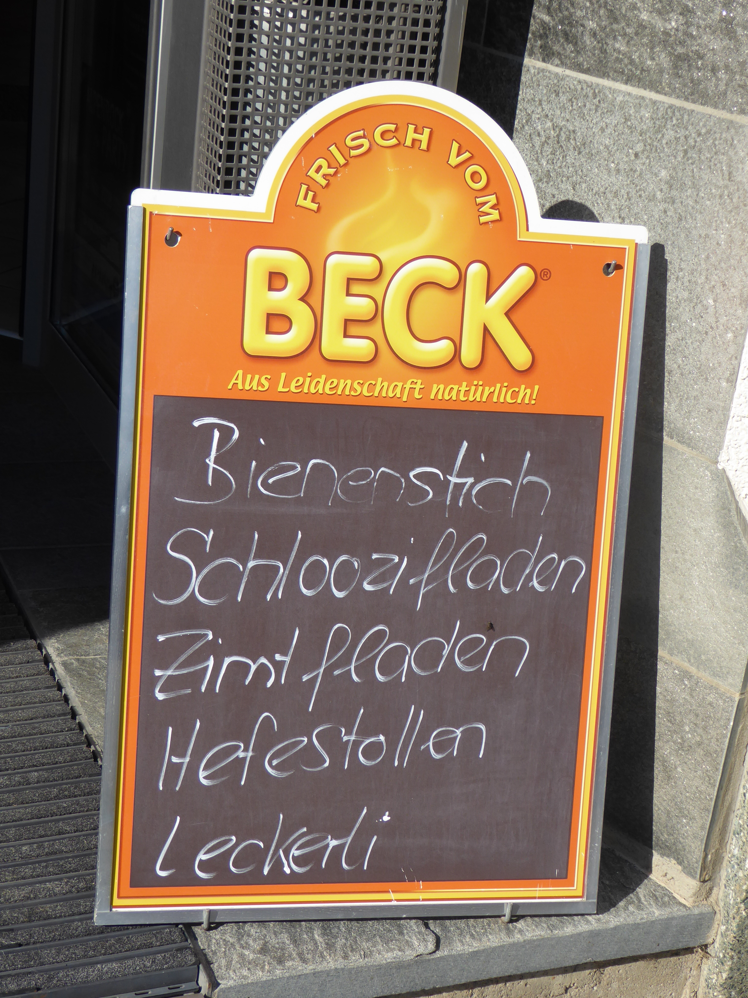 Aushang einer Bäckerei in Gonten